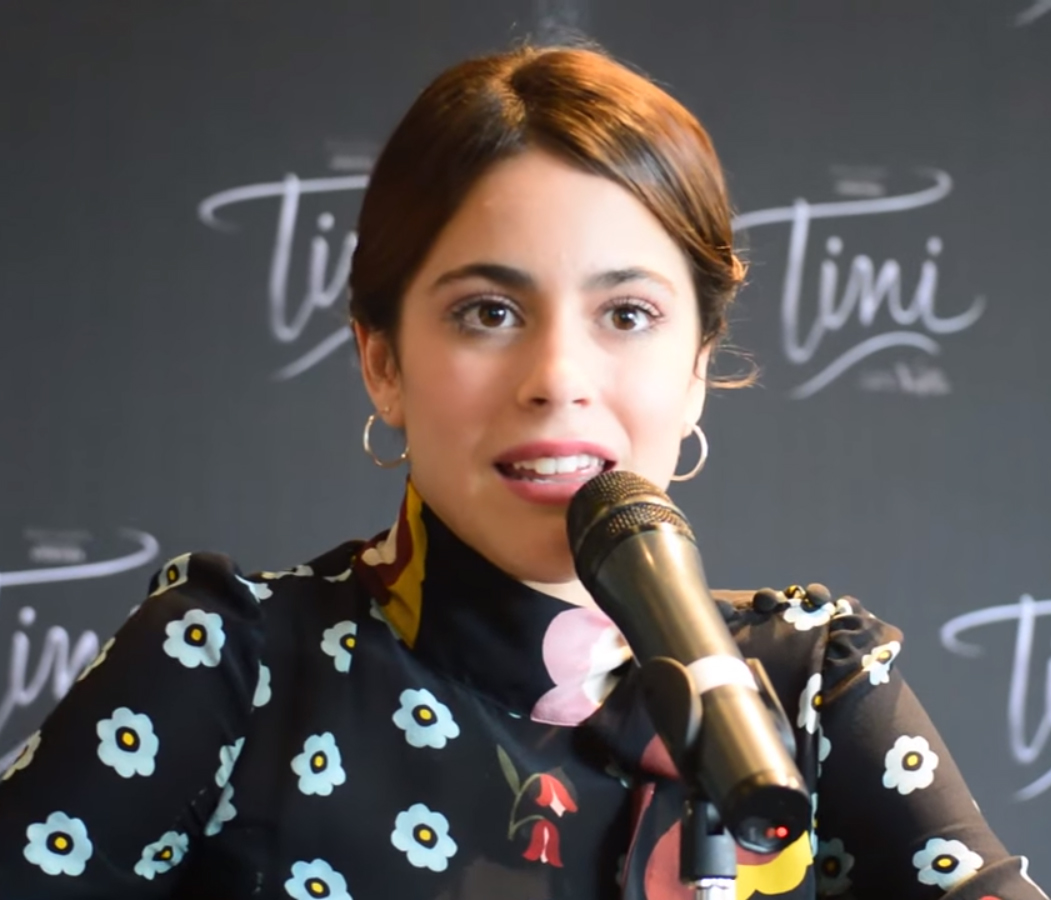 Tini Stoessel en una conferencia de prensa para la película Tni: El gran cambio de Violetta